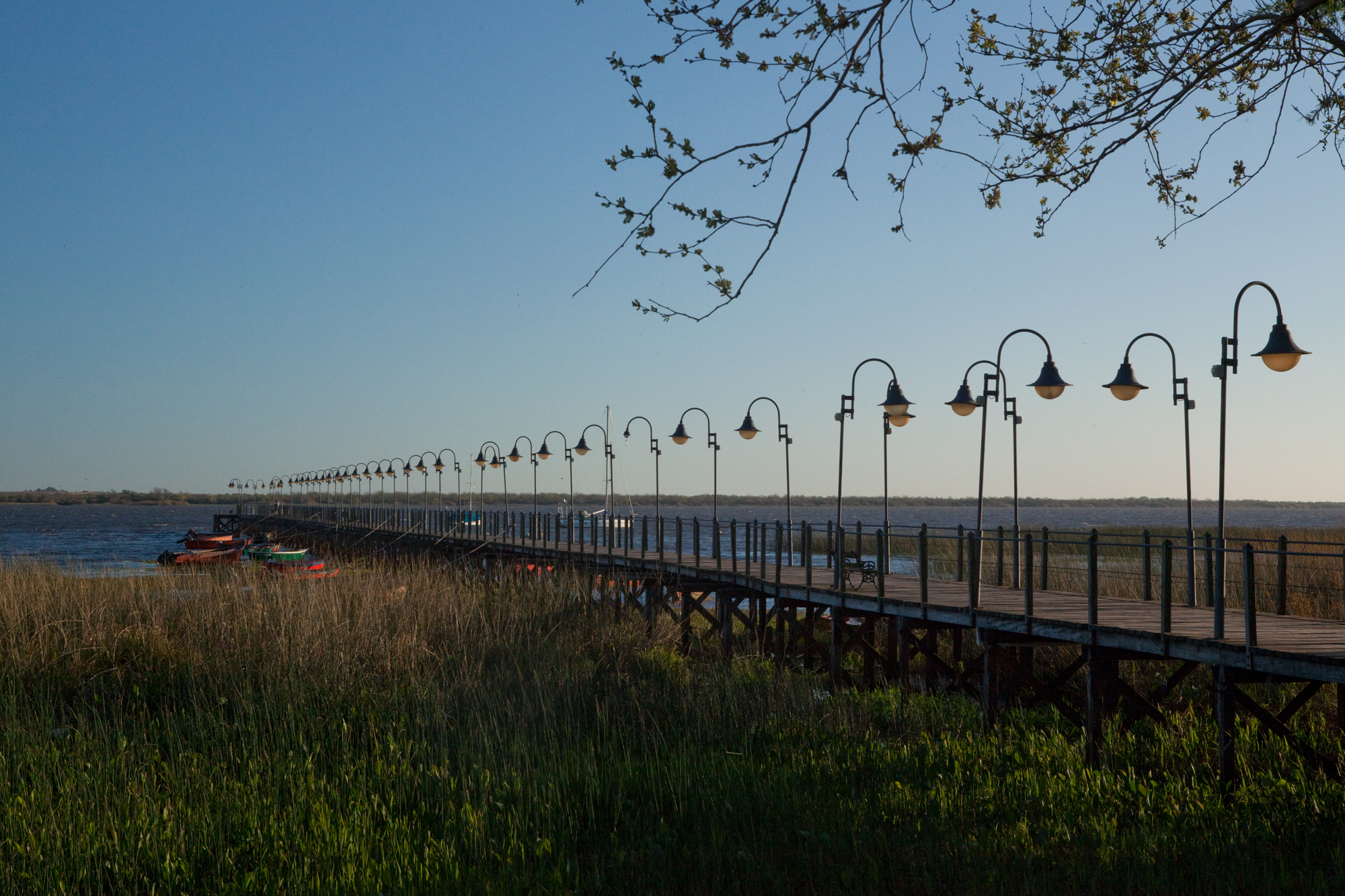 Trazado urbano de la antigua Villa de Santo Domingo de Soriano, comprendiendo las calles, avenidas, plazas y espacios libres.. Ubicada en el departamento de Soriano